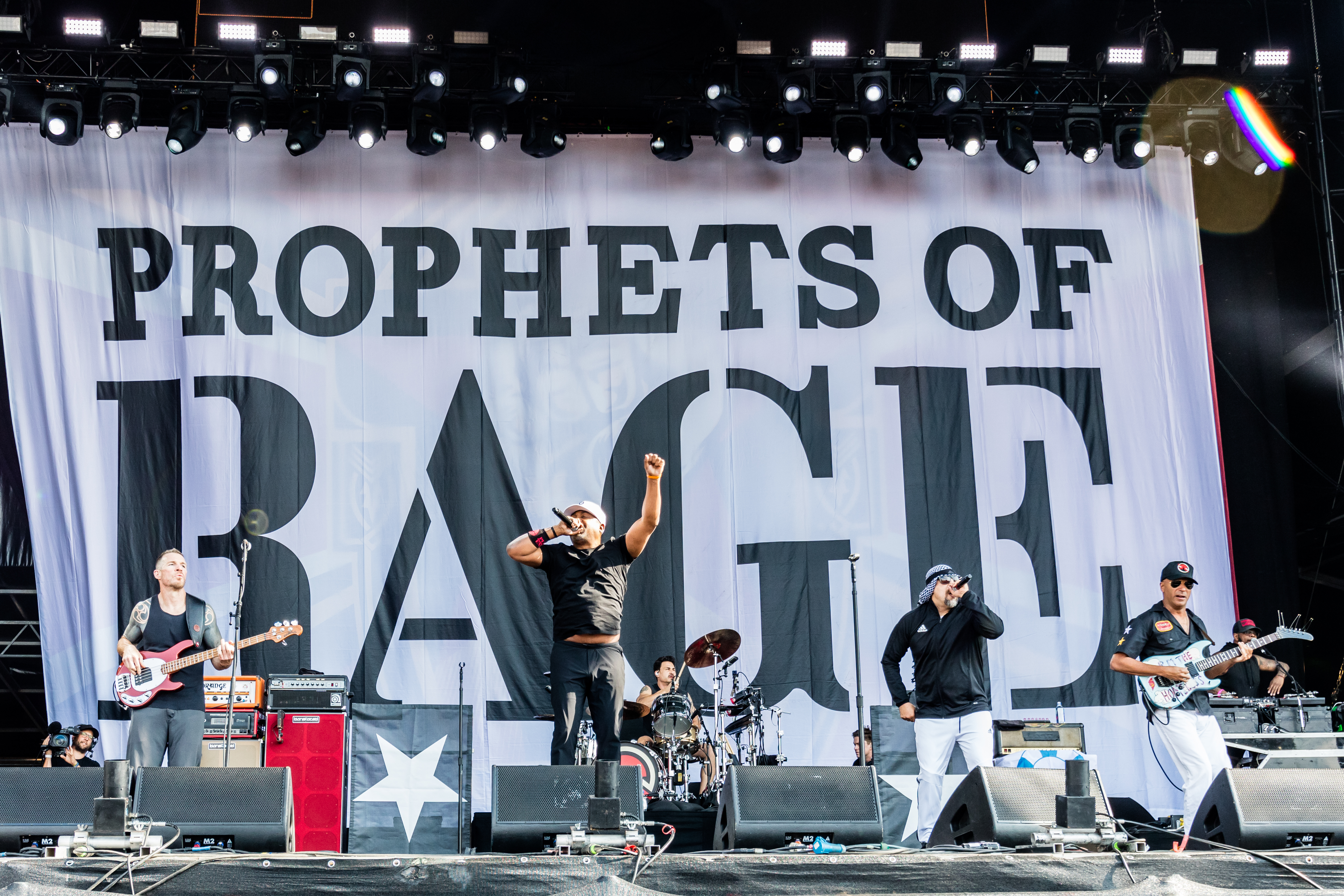 Prophets of Rage during Wacken Open Air at The Holy Wacken Land, Wacken, Schleswig-Holstein, Germany on 2019-08-03, Photo: Sven Mandel